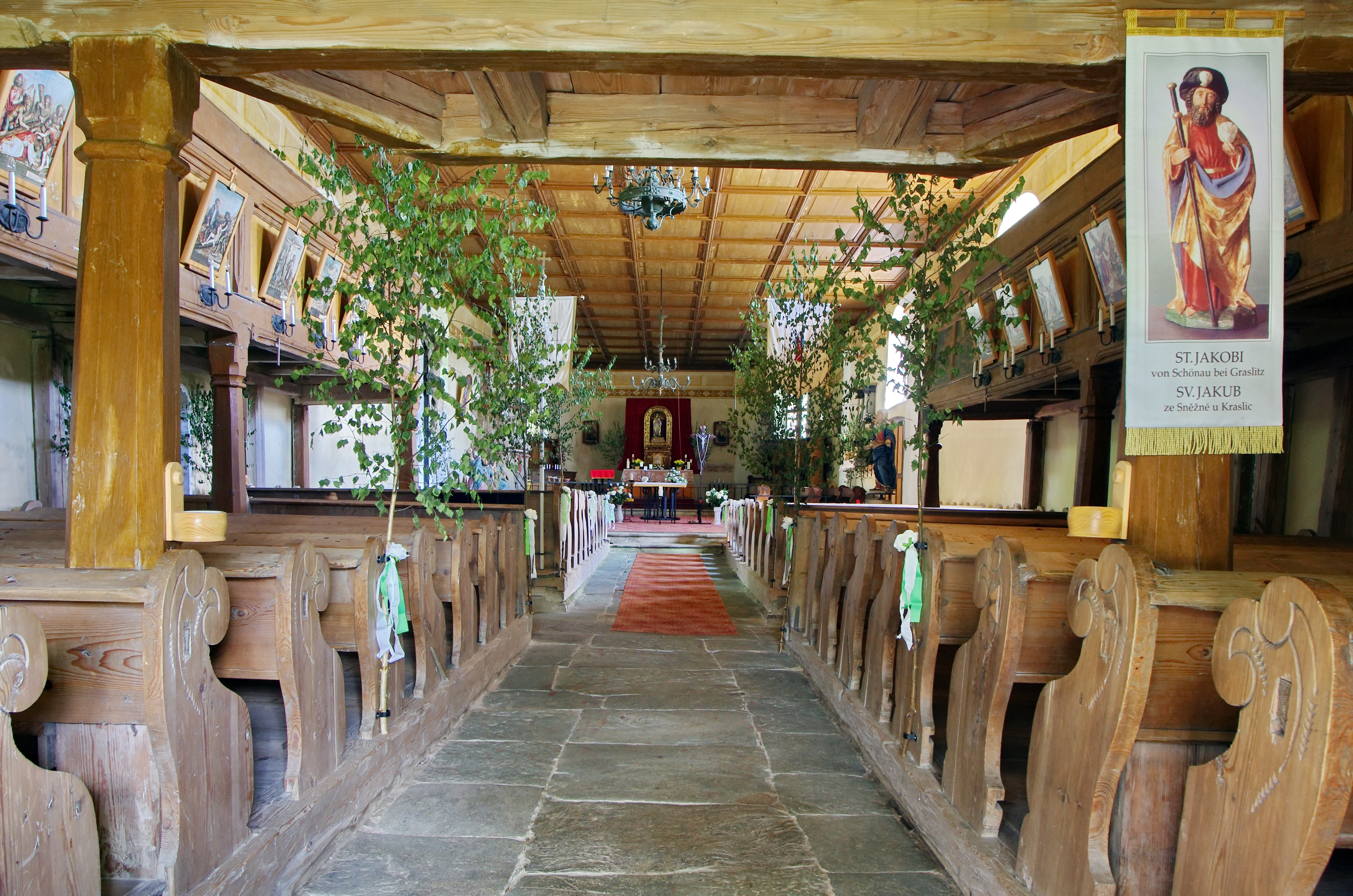 Kostel svatého Jakuba Většího, Sněžná, Sněžná (Kraslice).